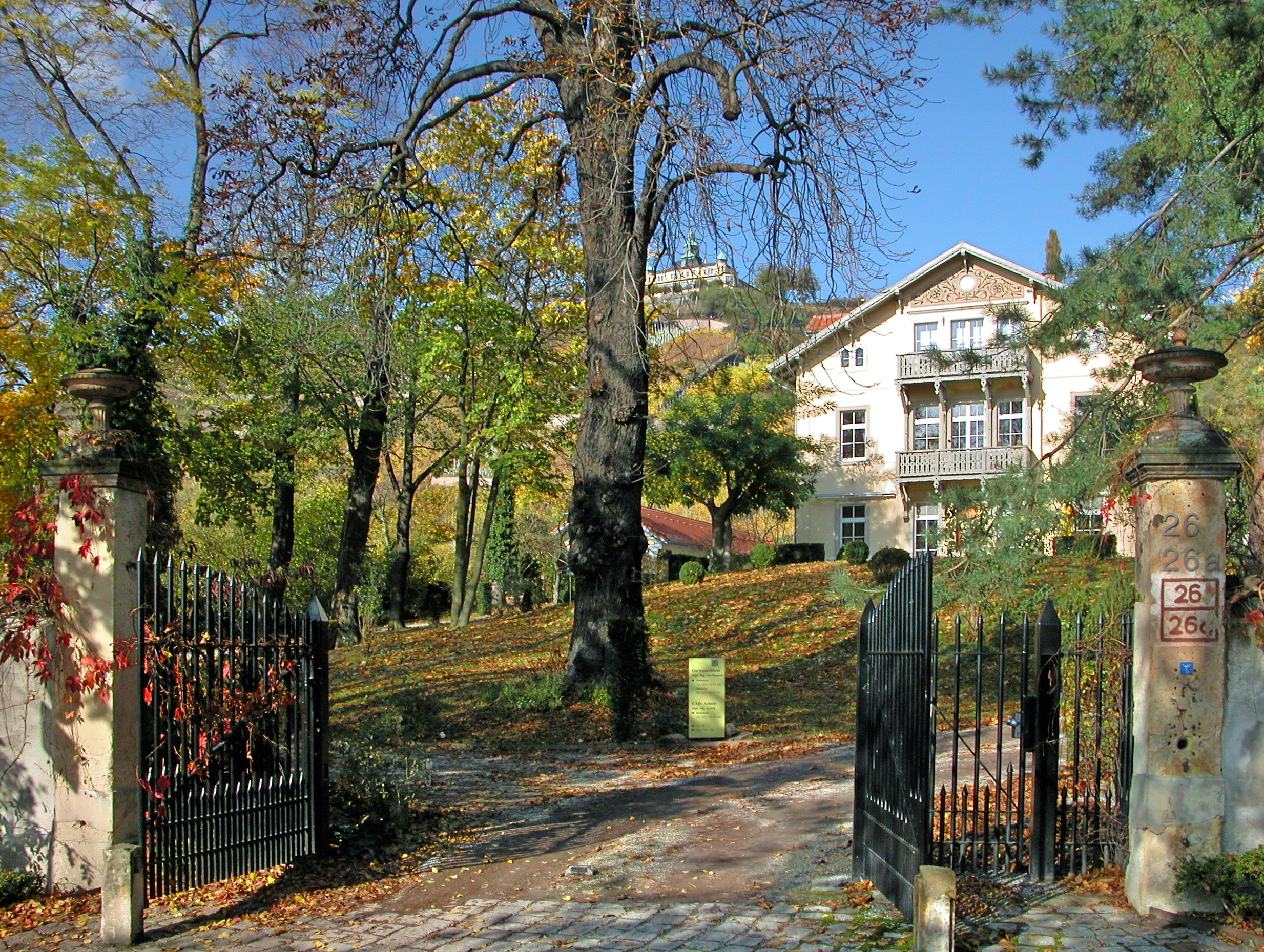 23.10.2008 01445 Radebeul: Weinbergstraße 26: "Villa Jordan", erbaut 1866 von Baumeister Moritz Ziller. Typisches Beispiel des Neorenaissance-Landhausstils der Lößnitz. Links im Hintergrund das Spitzhaus. [DSCN34879.TIF]20081023330DR.JPG(c)Blobelt